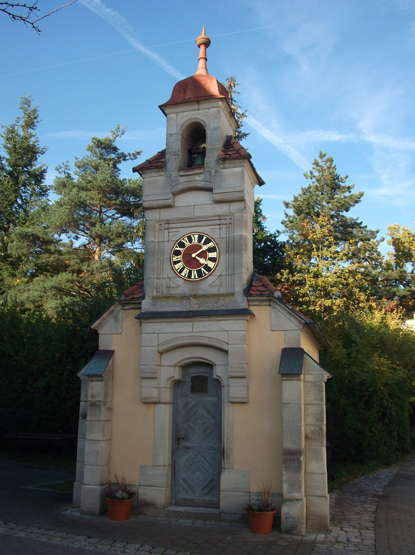 Kapelle von 1880 beim Wasserschloss Neuhaus